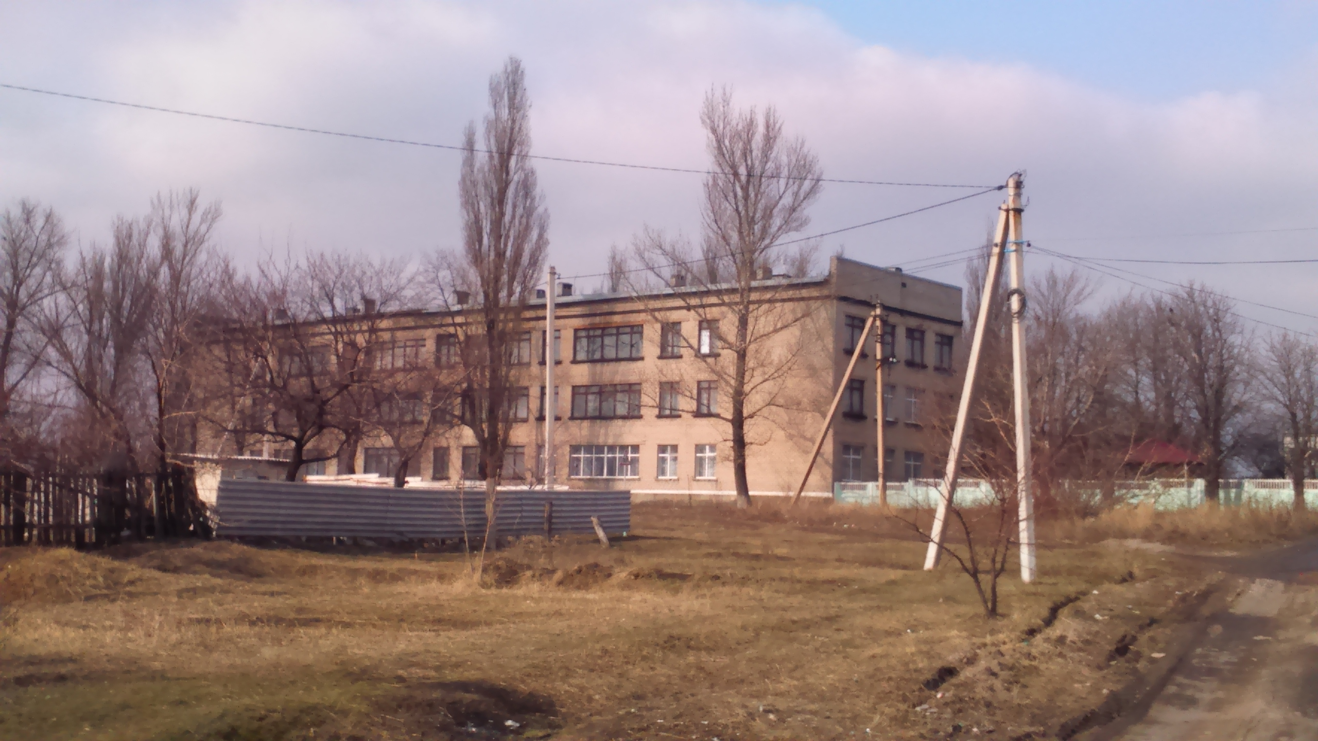 Школа № 3 збудована в 1963 р. за допомогою шахти імені РСЧА. В перші роки школа була восьмирічною. З 1967 р. — ЗОШ І-ІІІ ступенів. Першим директором школи призначили П. В. Фоменко. Багато років директором школи успішно працював Л. Ф. Бутєв. Нині школу очолює П. М. Поліщук.